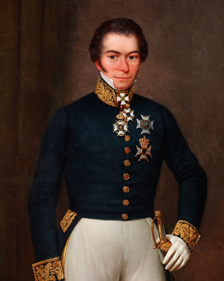 Jean-Louis Gilson, dit Frère Abraham Gilson /1741-1809): Jean-Baptiste Gellé (1777-1849), Chef de Division de la Préfecture du Département de Forêts (vers 1803).